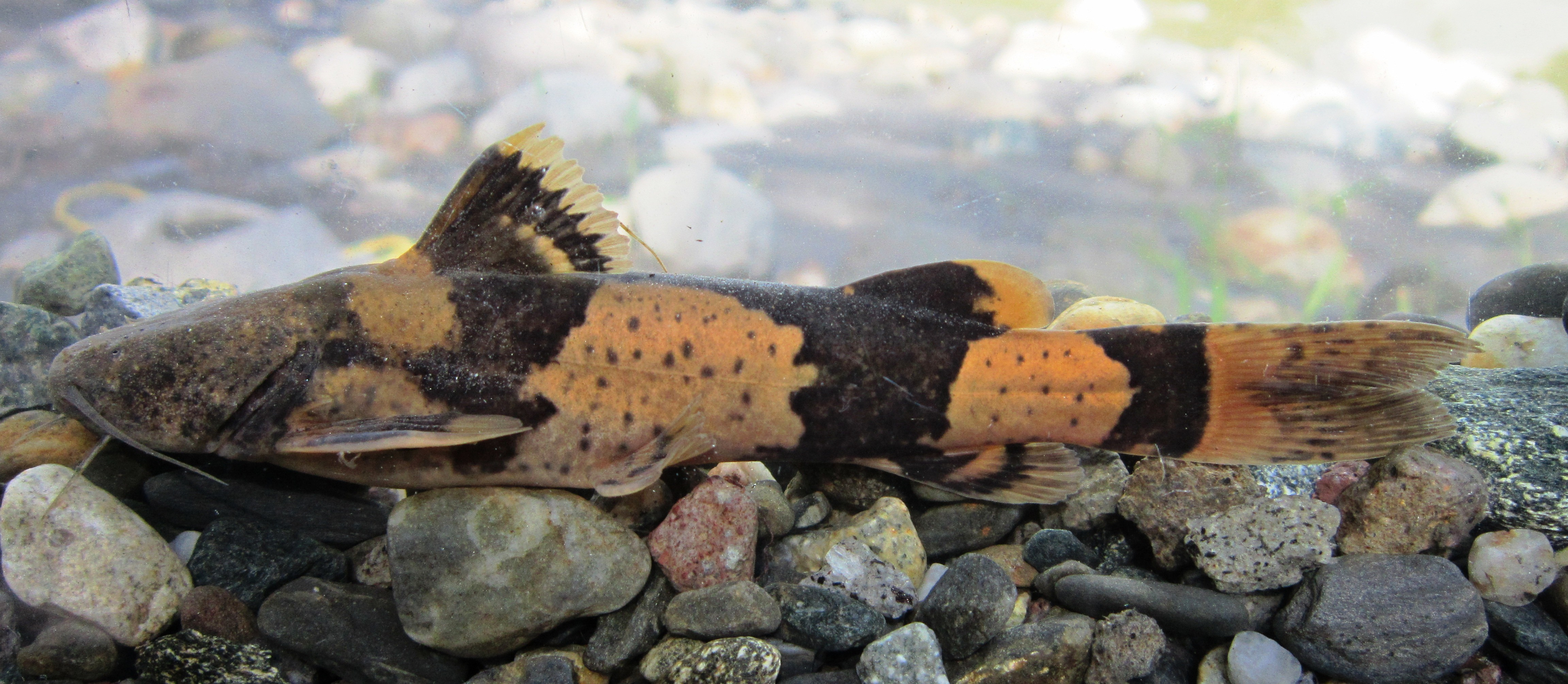 By: Ospina-Pavon J.